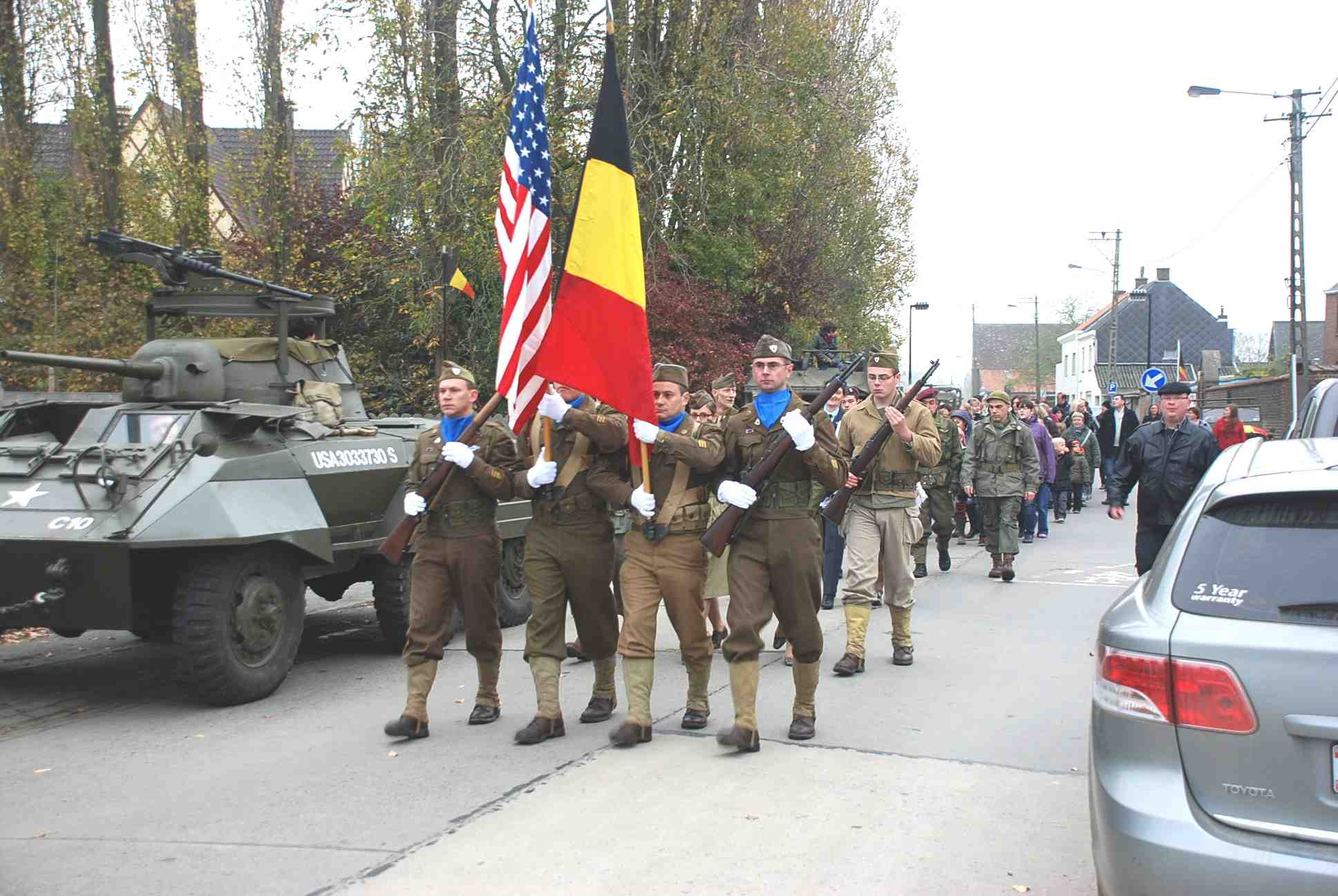 Chaque année,le11 novembre une grande cérémonie et organisée dans le village:Messe,receuilement devant le monument aux mort des résistants....hommage au crasch de Beauvolers...